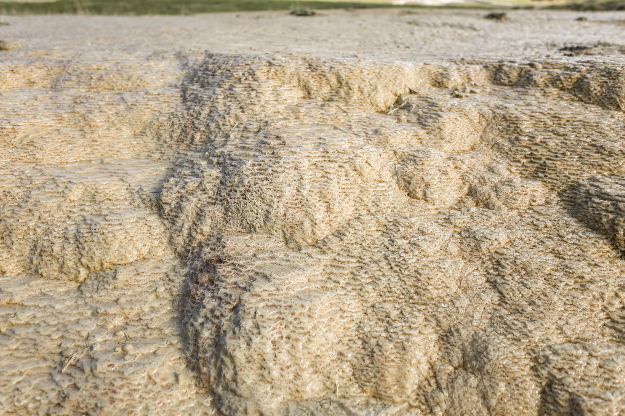 ღირსშესანიშნაობა: თრუსოს ხეობაში - კავკასიონის ჩრდილო ფერდობის ერთ-ერთ გასწვრივ ტექტონიკურ-ეროზიულ ქვაბულში - ბევრგანა არის წყაროების მიერ დალექილი კიროვანი ტრავერტინების დანაგროვები. ისინი მეტწილად დაკავშირებულია კარბონატულ წყებასთან. ტრავერტინების ერთ-ერთი უმნიშვნელოვანესი და თვალწარმტაცი ადგილსამყოფელი კასრისხევის ვიწრობის ზემოთაა, თერგის მარჯვენა ნაპირზე. აქ ბლომადაა ინტენსიური განვითარების პროცესში მყოფი, წყლის მიერ მოდელირებული ტრავერტინული „მინდვრები“. გამჭირვალე წყალი თხელ ფენად ეფინება ამ თვალისმომჭრელ თეთრ ზედაპირს და აჩენს უამრავ მოკამკამე პატარა გუბეს. მდებარეობა: ყაზბეგის მუნიციპალიტეტი, თრუსოს ხეობა, მდ. თერგის მარჯვენა ნაპირი, ცენტრალური საავტომობილი გზის პირას, სოფ. ქეთერისიდან სამხრეთ-აღმოსავლეთით, 2093 მეტრი ზღვის დონიდან.